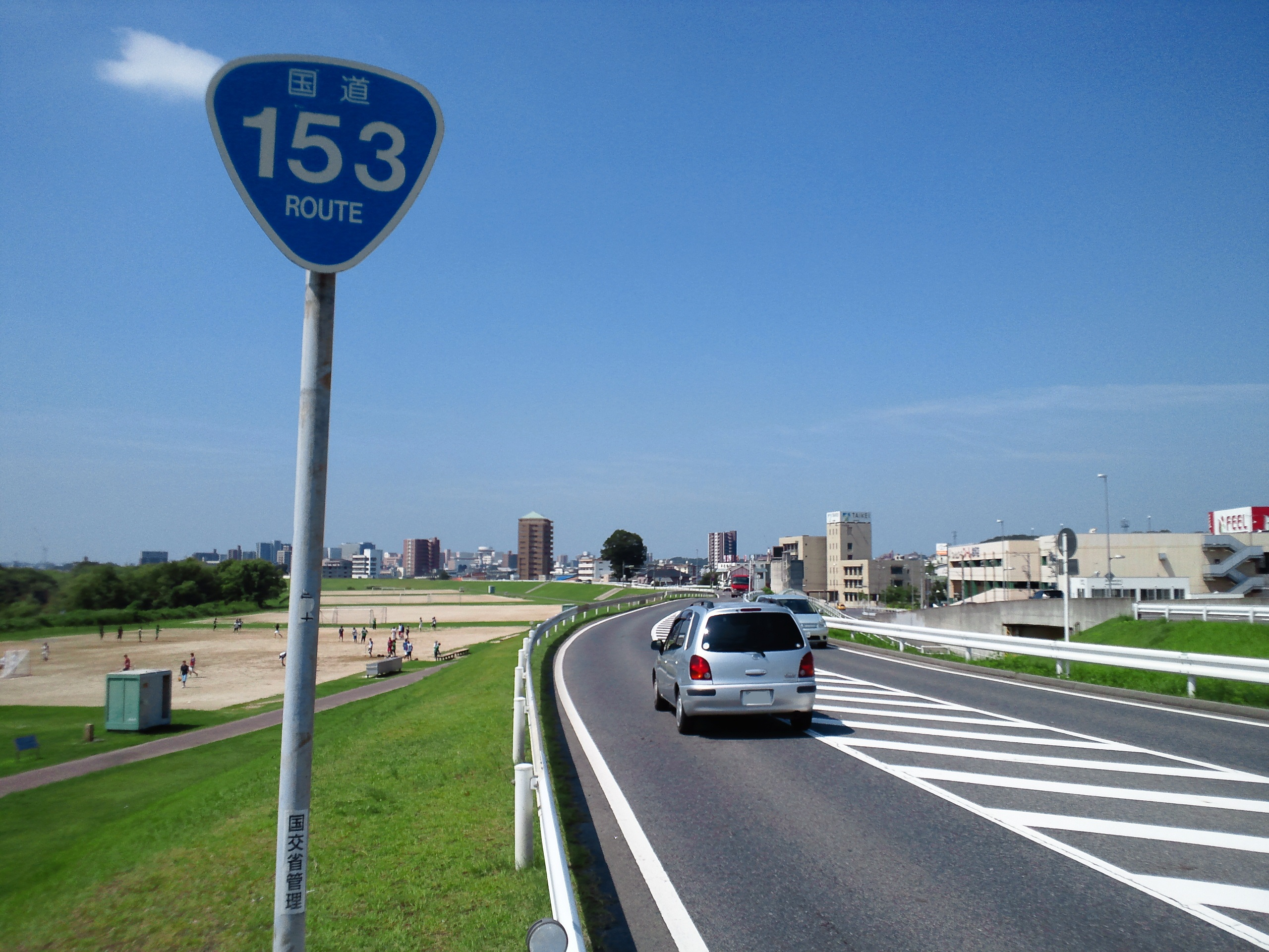 豊田市東梅坪町付近の国道153号。